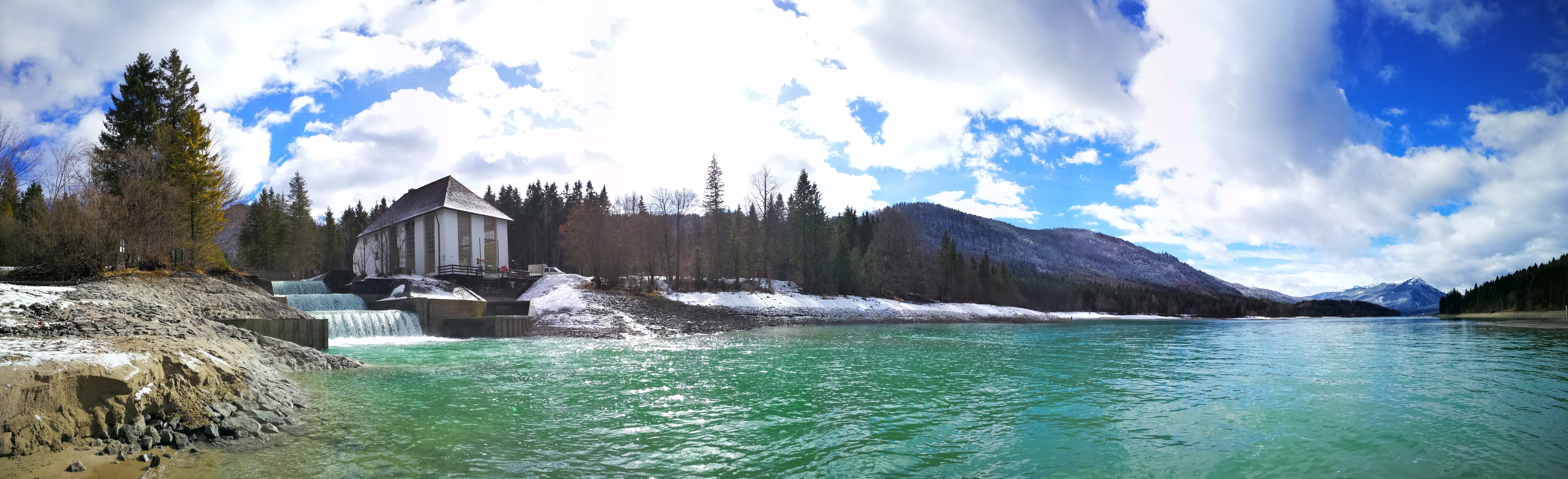 Pano-Niedernachbucht